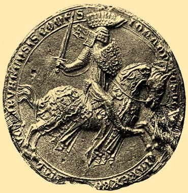 Jan Lucemburský - jezdecká pečeť